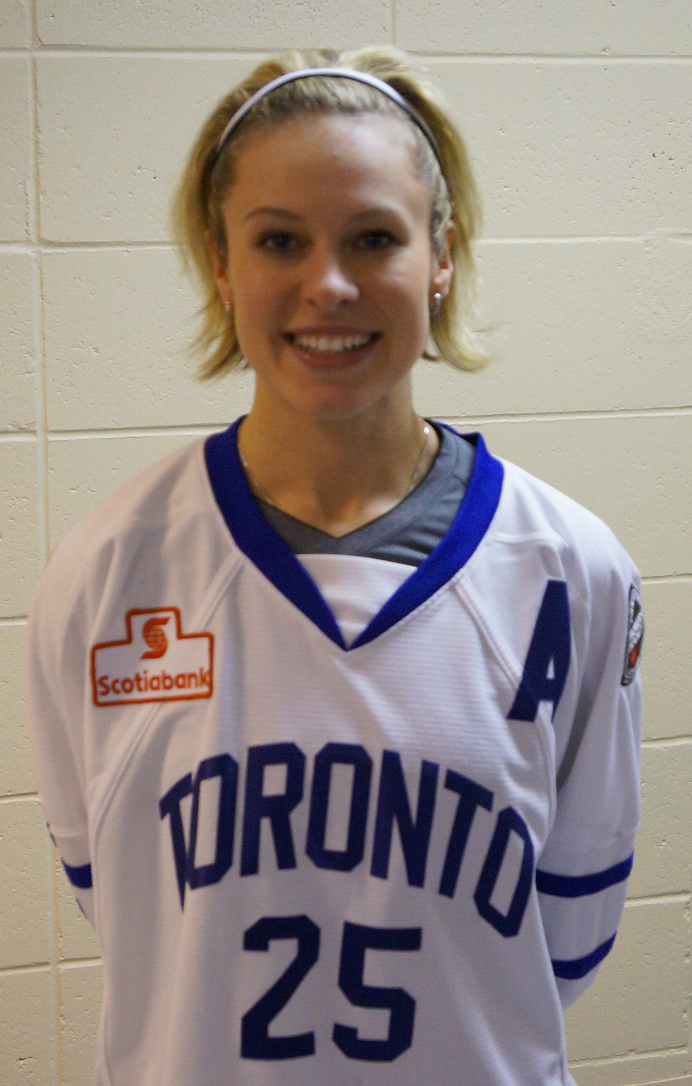 Tessa Bohomme, Toronto Furies